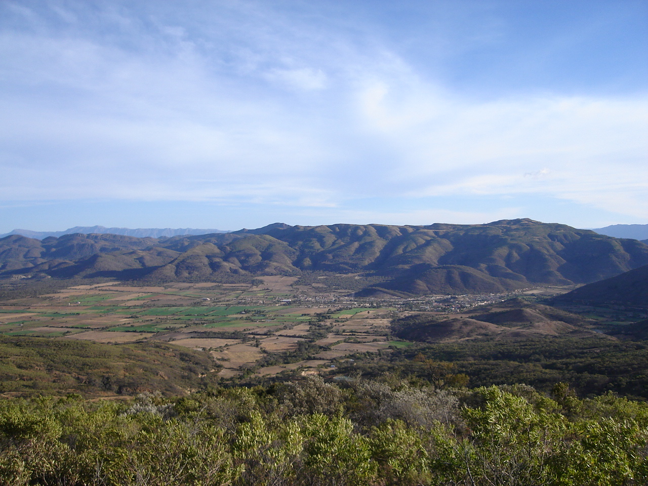 Vista Panoramica Comarapa